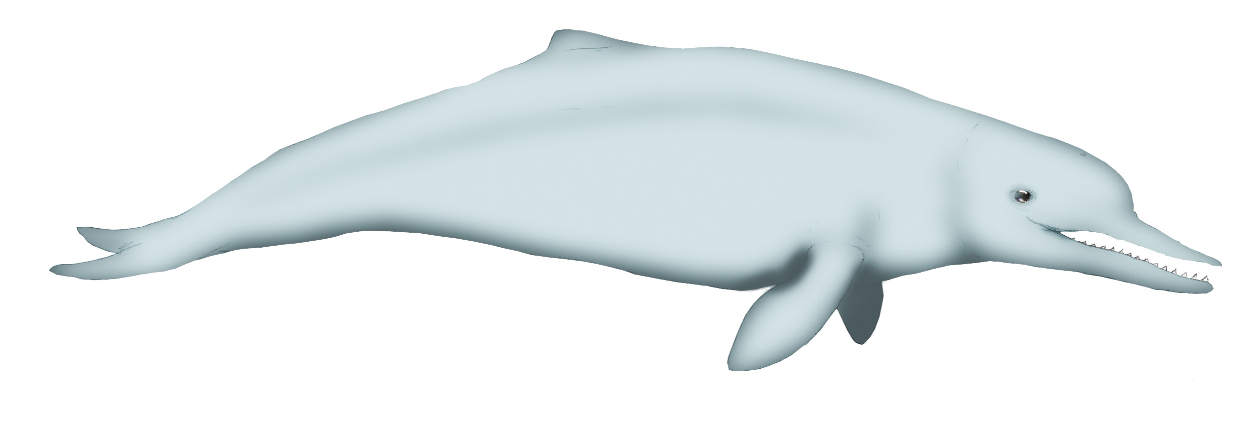 Restoration of Cotylocara